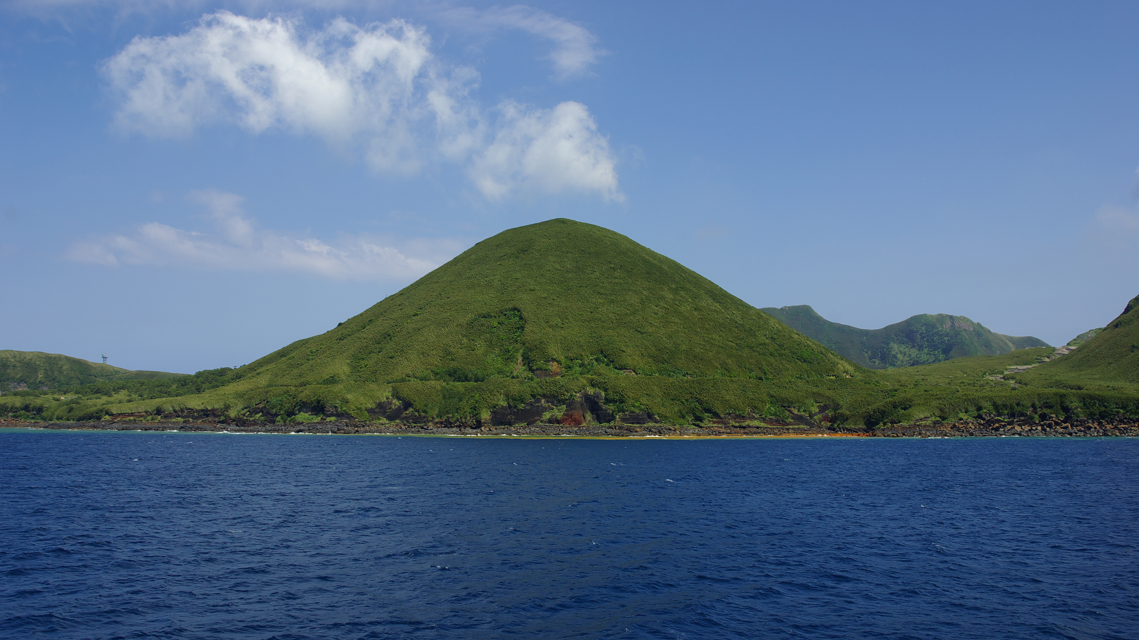 薩摩硫黄島の稲村岳。南側海上、フェリーみしまより撮影。